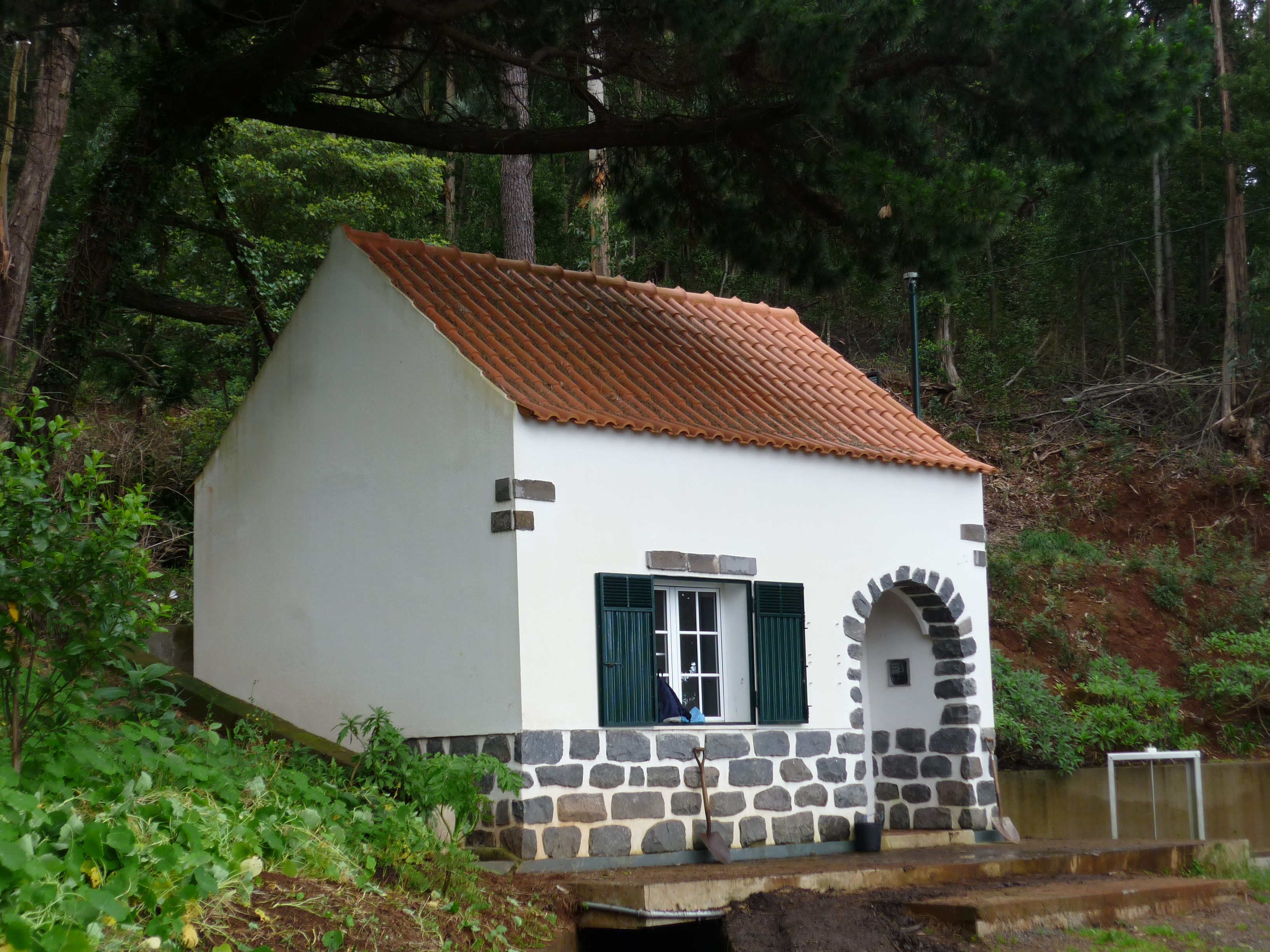 Levadeiro szolgálati lakása (a Levada dos Tornos mellett, Funchal, Madeira)